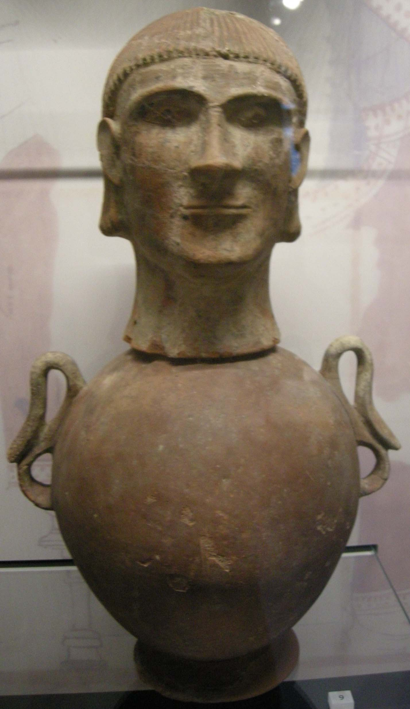 Canopo da todi, VI sec. ac.